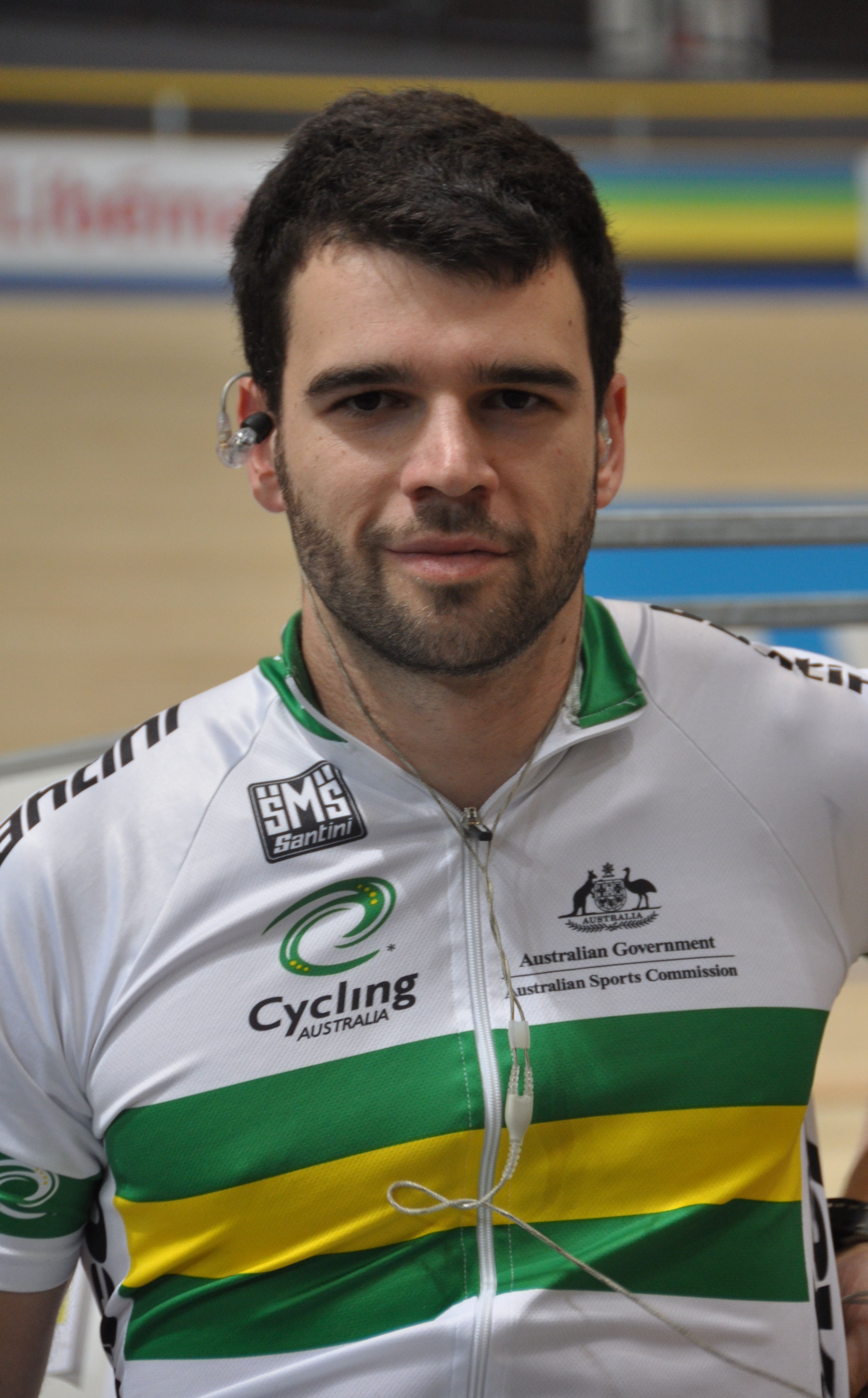 Nathan Hart, australischer Radsportler